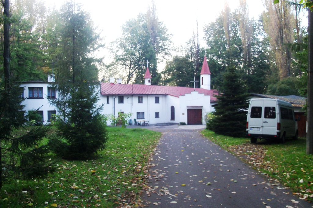 Kościół w Katowicach-Załęskiej Hałdzie (ul. Bocheńskiego)